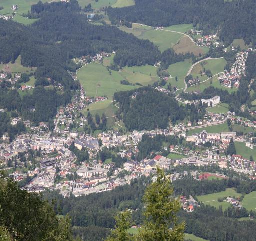 Berchtesgaden vom Kehlsteinhaus aus gesehen